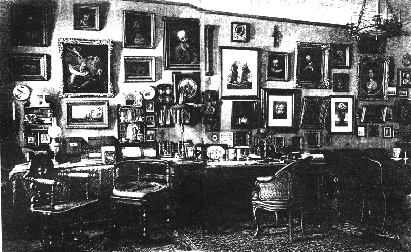 Nikolai Leskov's study in Saint Petersburg